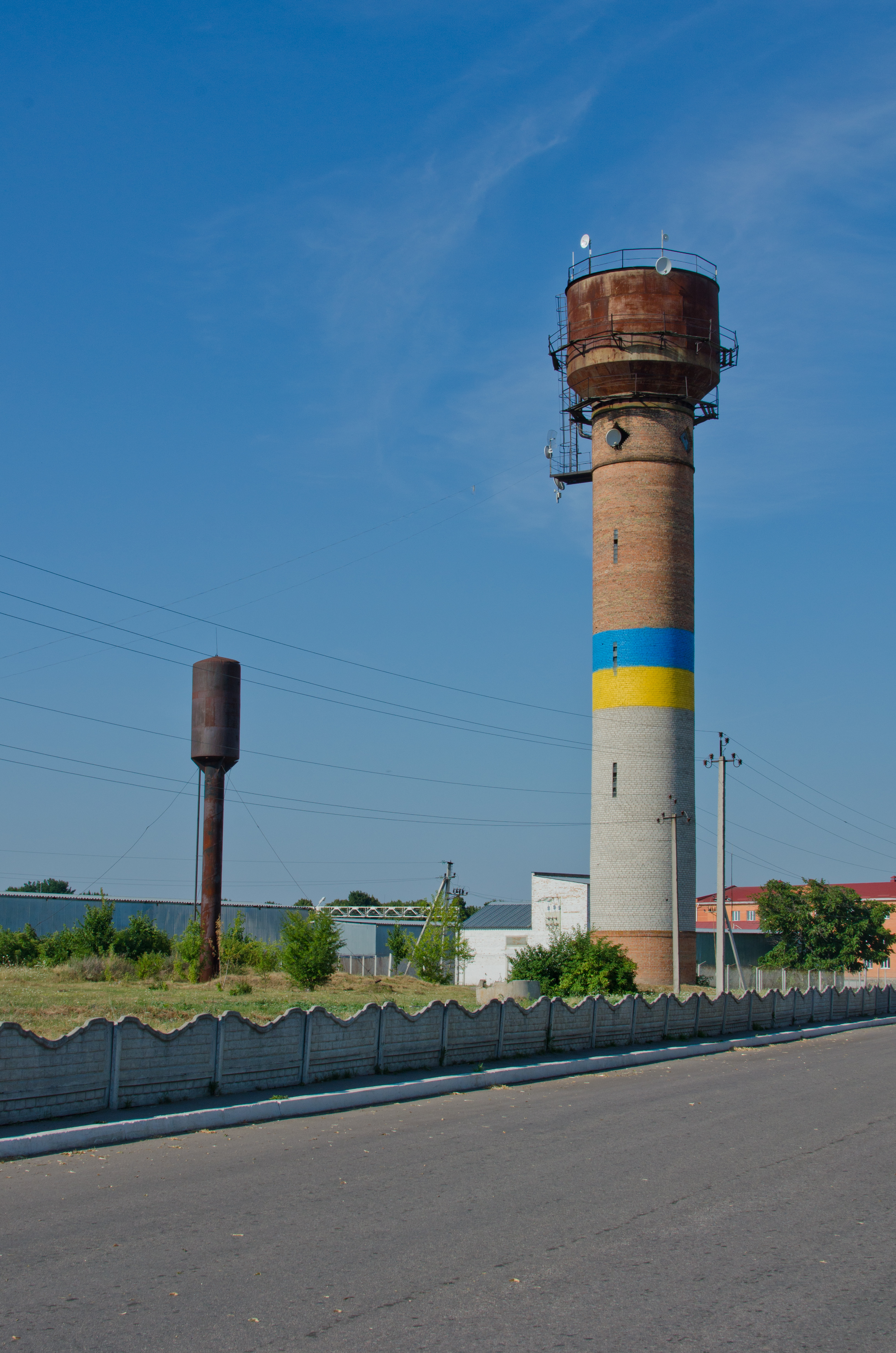 Водонапірна вежа у селі Шкарівка.